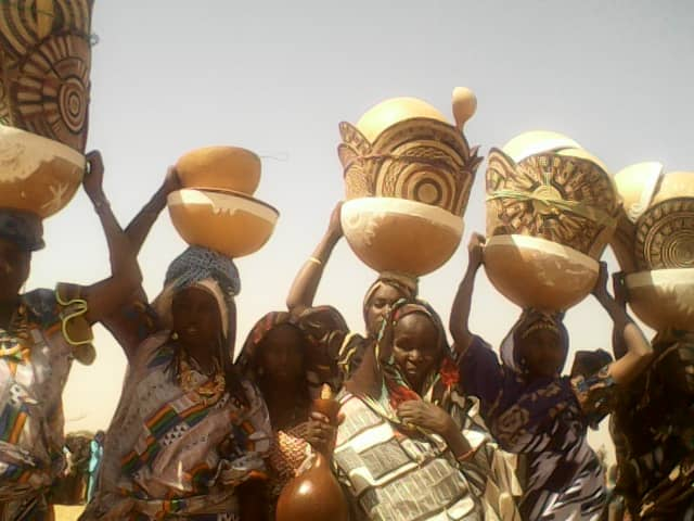 wikichallenge 2019 niger